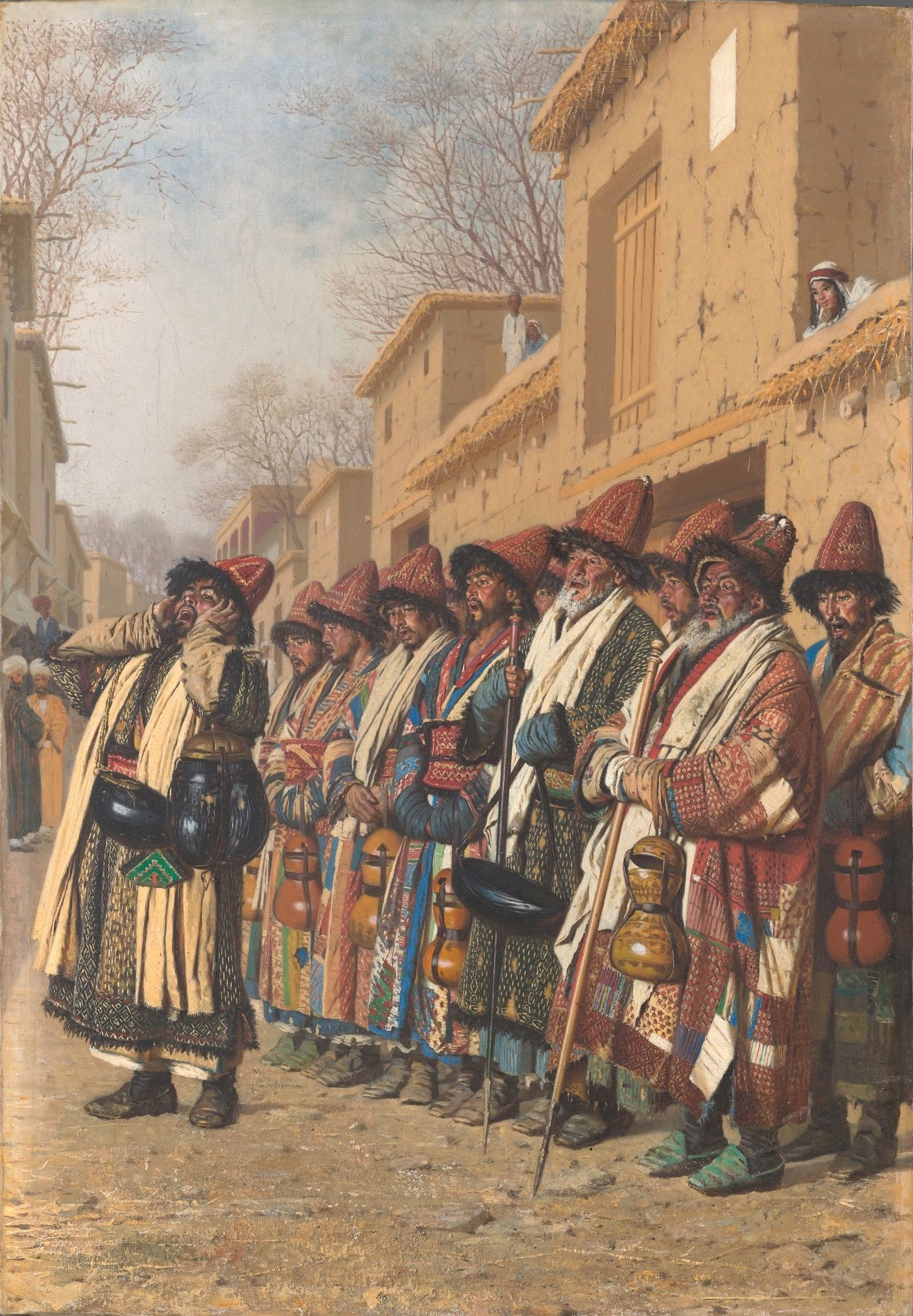 Хор дервишей, просящих милостыню. Ташкент